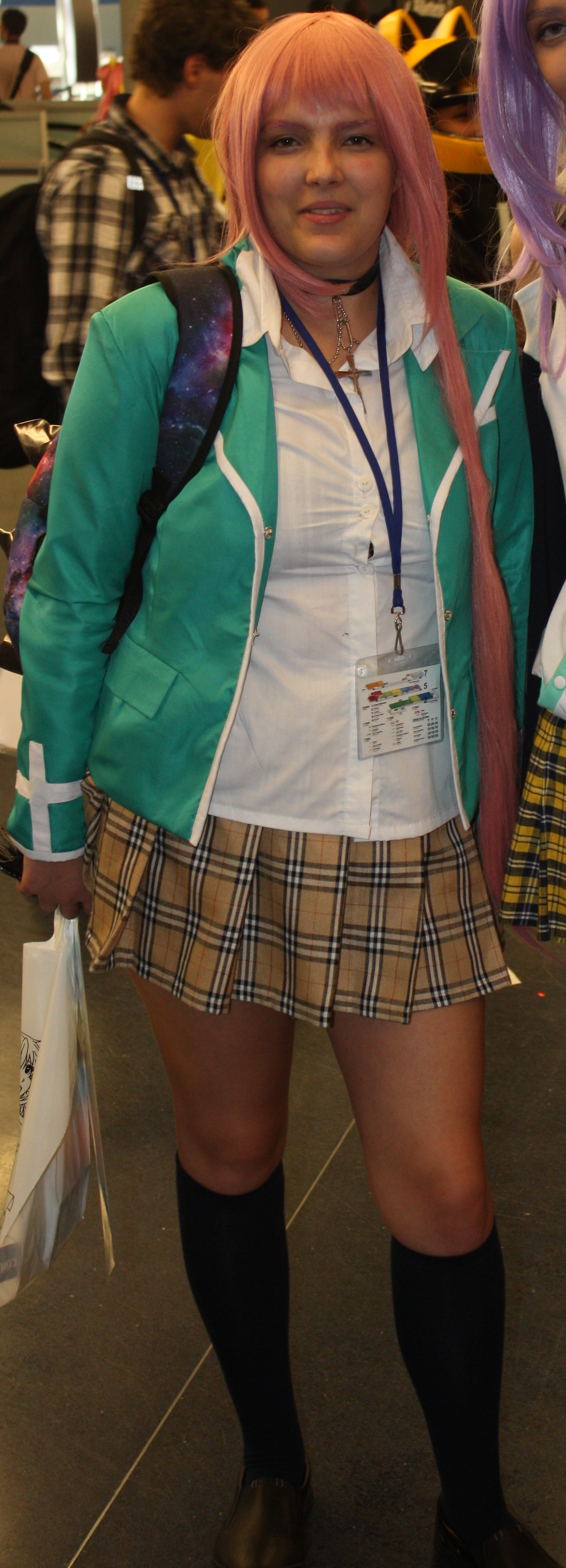 Otakuthon 2014: Moka Akashiya